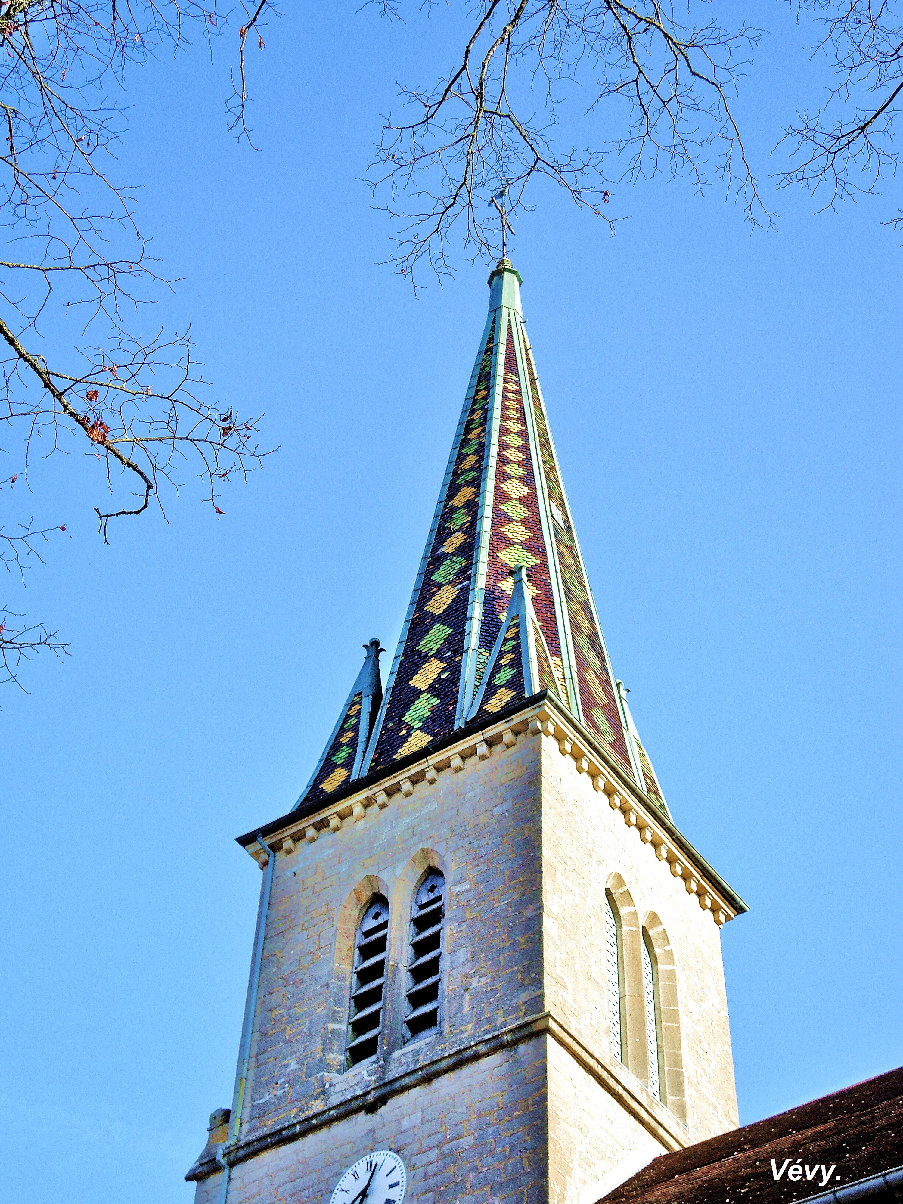 Clocher de l'église de Vévy. Département du Jura. France.